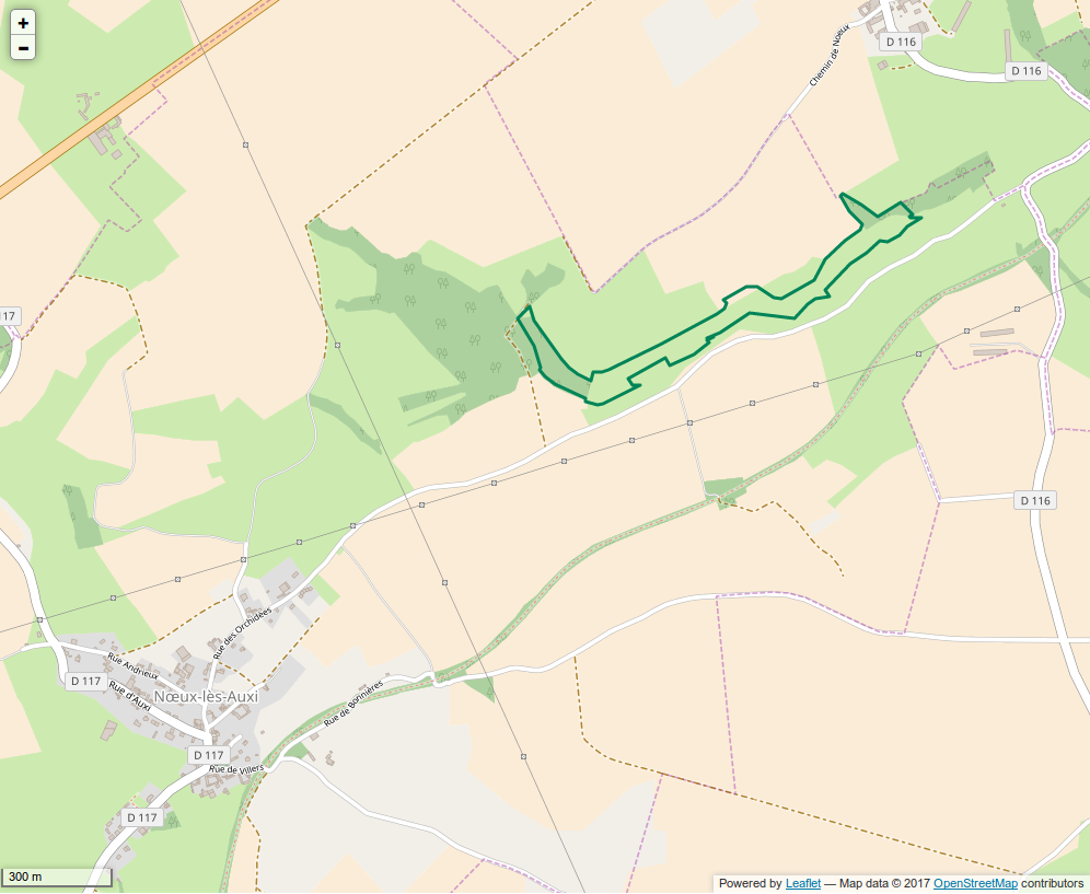 Périmètre de la RNR des Riez de Noeux-les-Auxi.